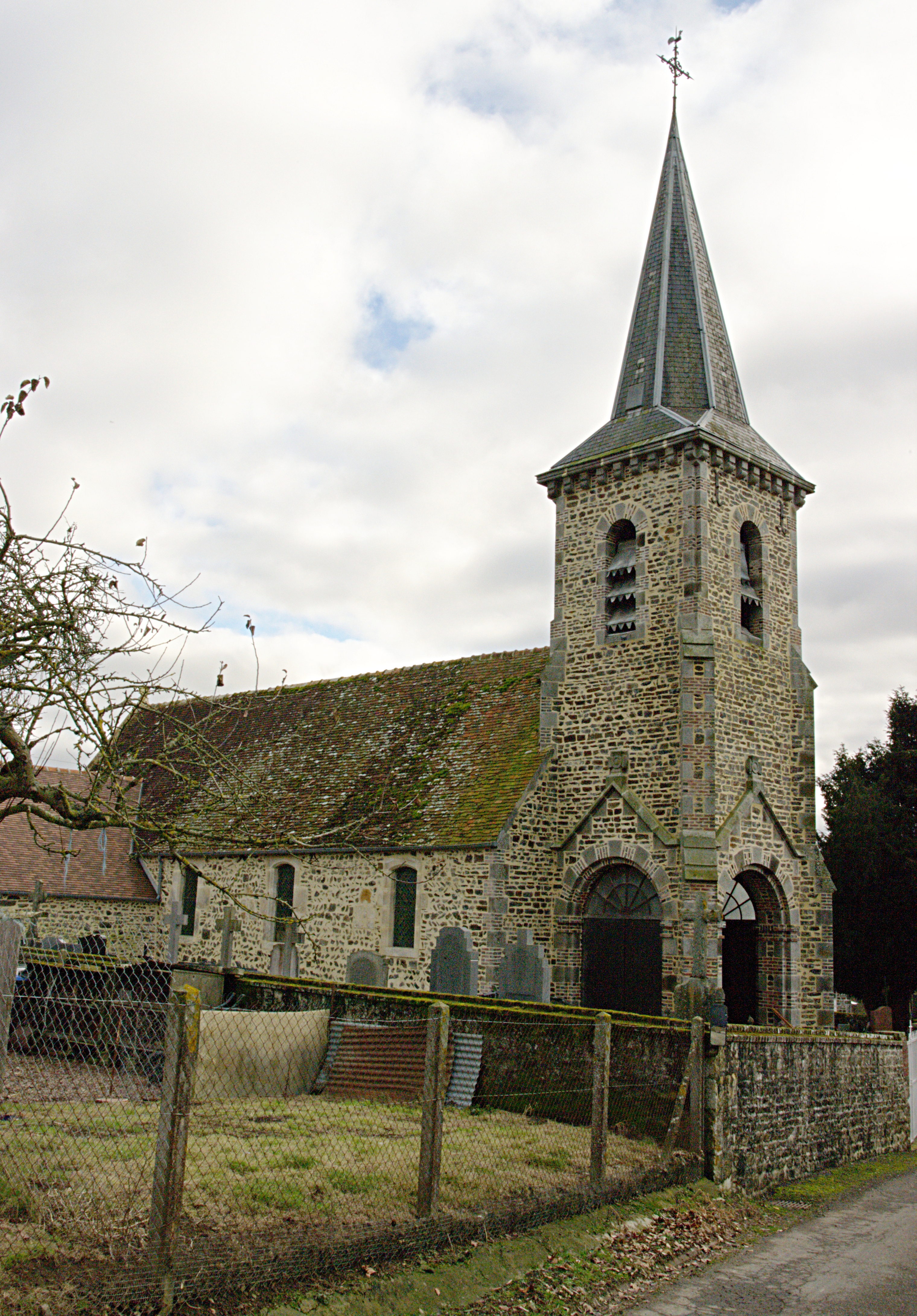 L'église de Ménil-Vin, Orne.Le mur nord de la nef est en arête-de-poisson